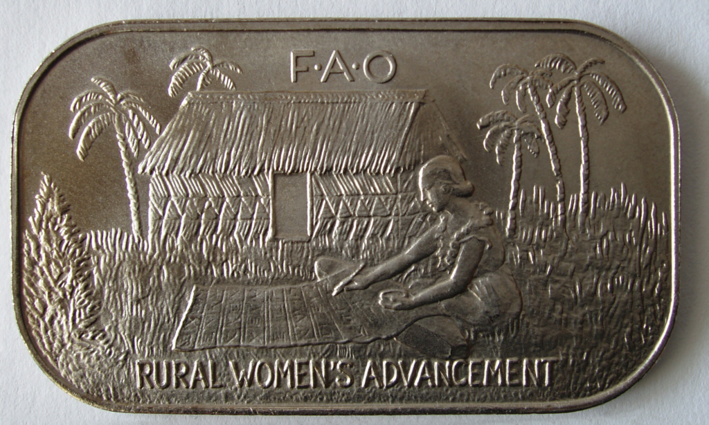 Tonga, 1 Pa'anga, 1980, back, 27 x 42 mm, cu/ni